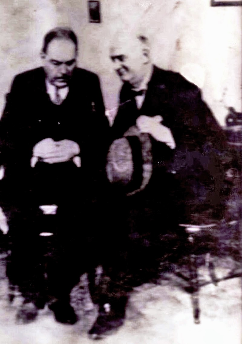 Los presidentes Hipólito Yrigoyen y Marcelo T. de Alvear juntos, en una foto de la década de 1910 o 1920.